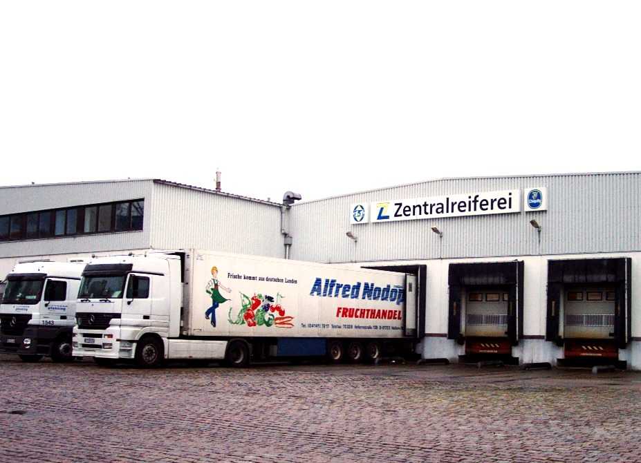 Bananen-Reiferei in Bremerhaven